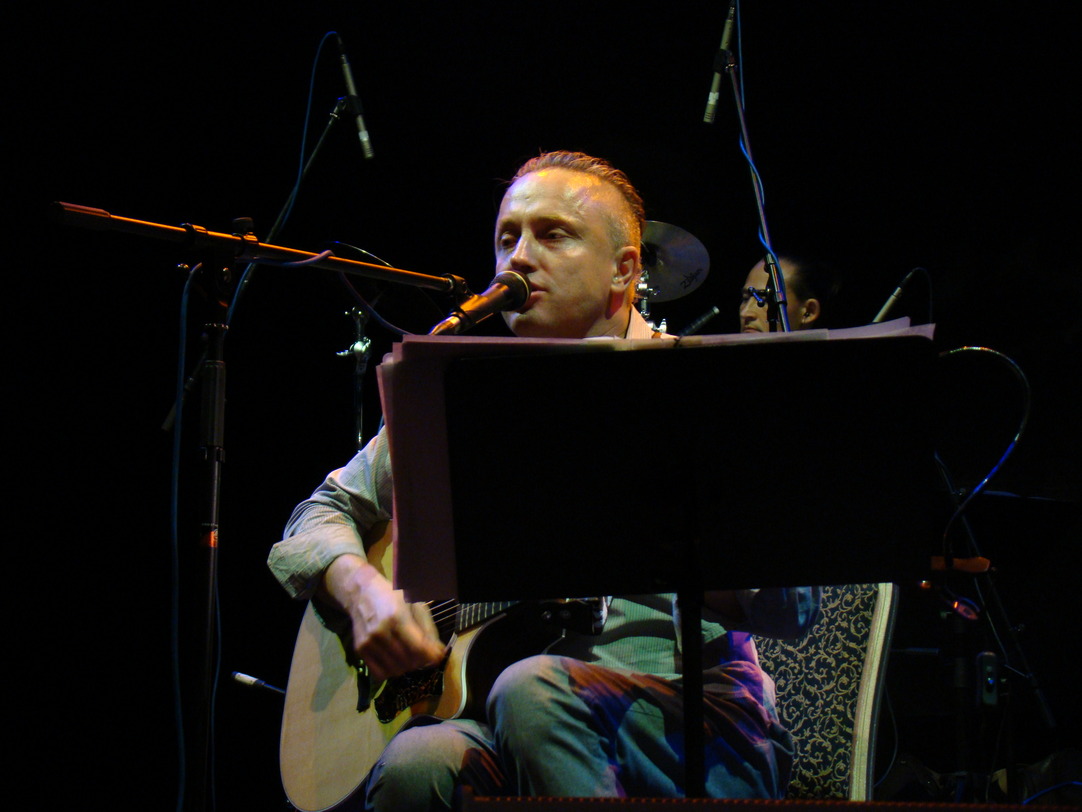 Концерт Павла Кашина в московском клубе "ГлавClub"